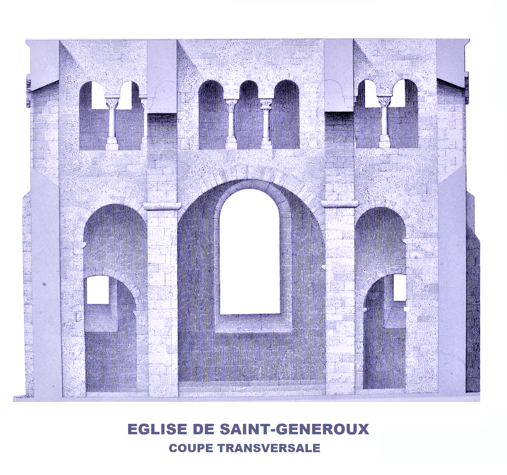 Eglise de Saint-Généroux, coupe transversale (image du domaine public (Gailhabaud, 1858) modifiée)